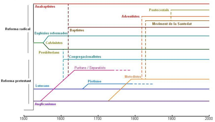 esglésies reformades